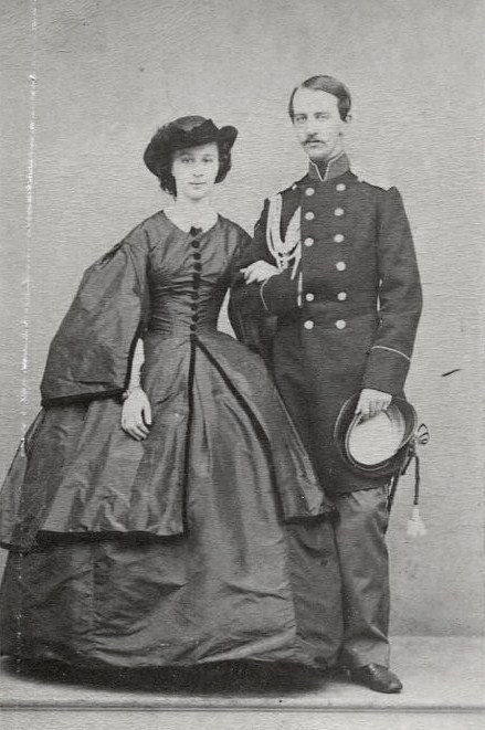 Юрий (Георгий) Александрович Борх (1836—1908) с женой Варварой Павловной, ур. Чичериной (1839—1910).